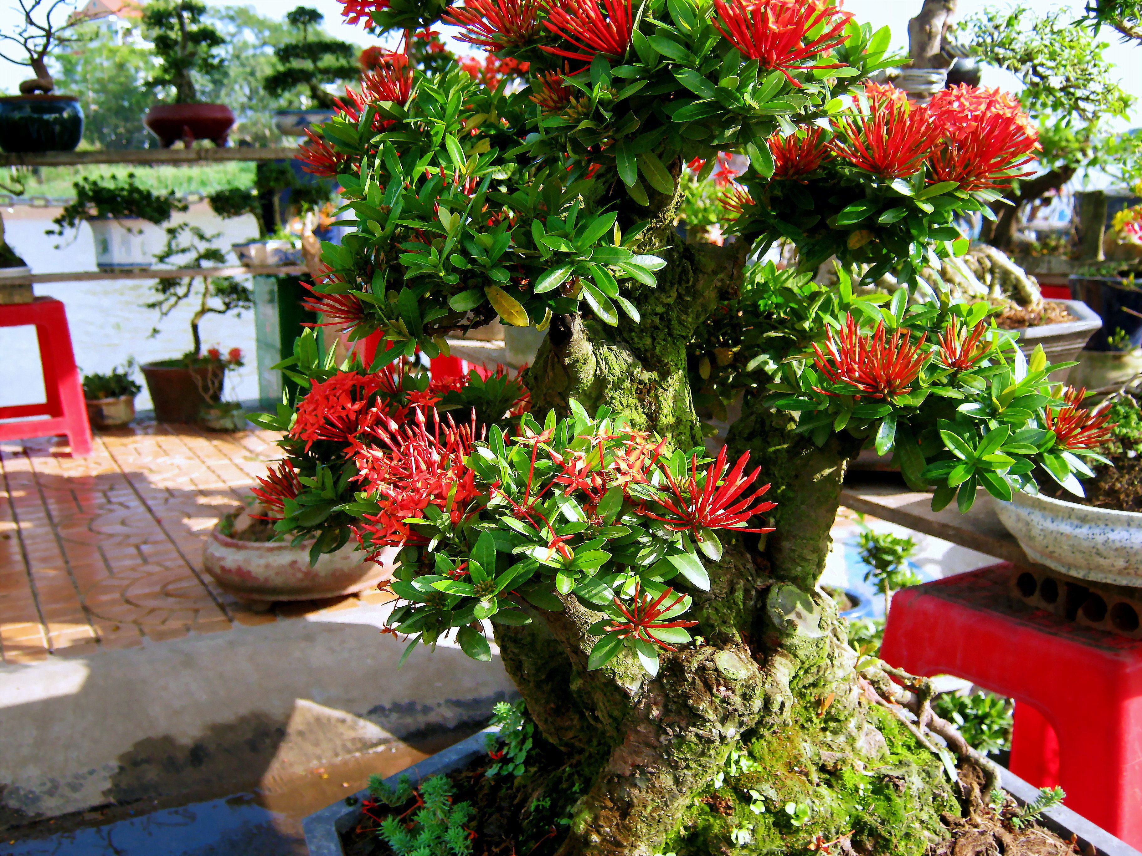 Trang bông đỏ (mẫu đơn đỏ) cổ thụ ở An Giang, Việt Nam.